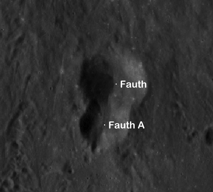 Cráter lunar Fauth. (Imagen LRO)